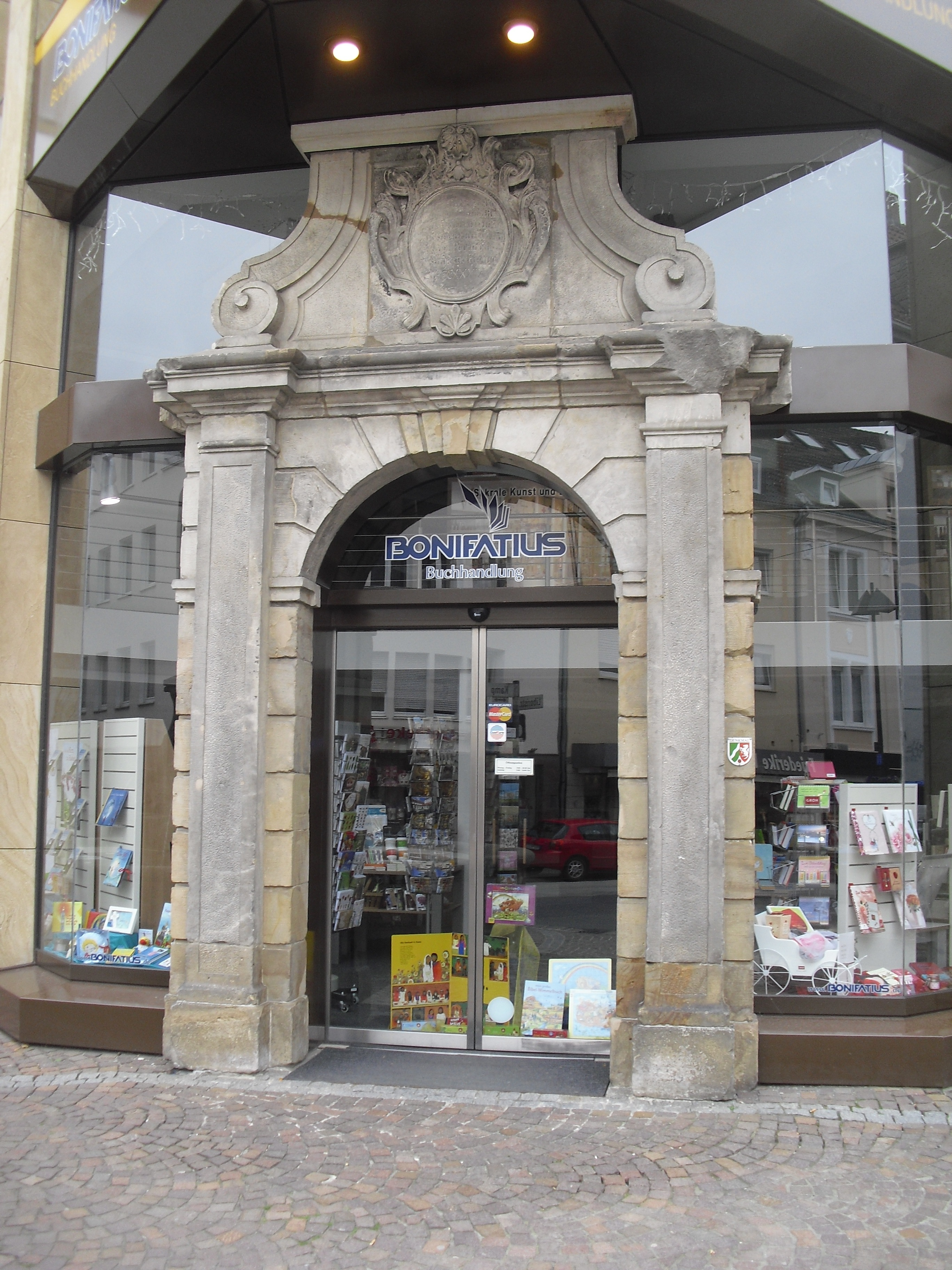 Portal der Bonifatius Buchhandlung in Paderborn (Liboristr./Kamp) früher Portal des „Zucht- und Fabrikenhaus“ an der Kreuzung Marien- und Königstraße (1945 zerstört, heute C&A) This is a photograph of an architectural monument. Inschrift: Incremento Reipublicae sub Regimine serenmi et illmi D. Clemens Augusti ex Ducibus Bavar: Archiepiscopi et Elect. Colonien. Episcopi Paderborn. Ordines Patriae erigi Fecerunt MDCCXXXIX.